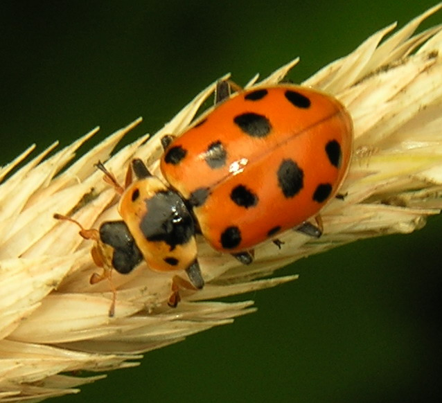 Trylikataškė boružė (Hippodamia tredecimpunctata) Šeima. Boružės (Coccinellidae) Foto: Algirdas, 2006 m. liepos 11 d., Lietuva